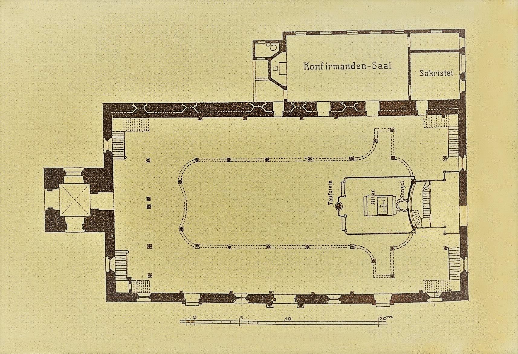 Grundriss der Stadtkirche Göppingen, Darstellung aus Buch von 1924